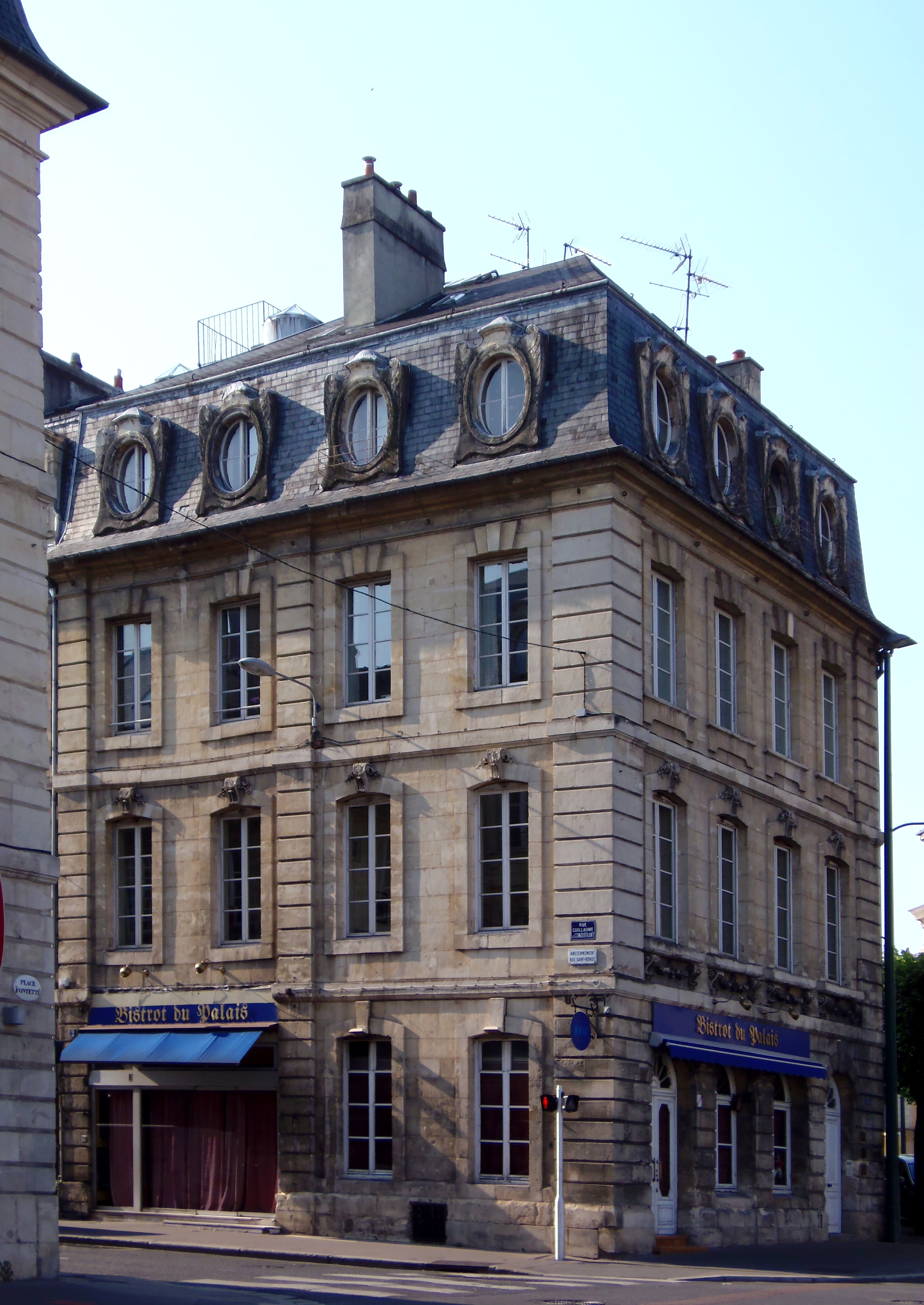 Caen (Normandie, France). Bâtiment, place Fontette.